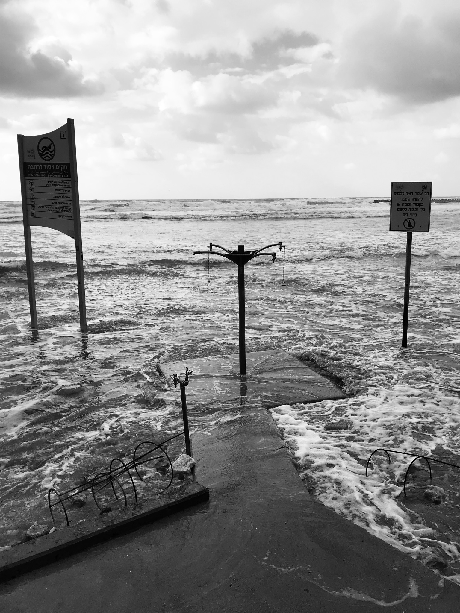 רצועת חוף מציצים בעת הצפה בחורף